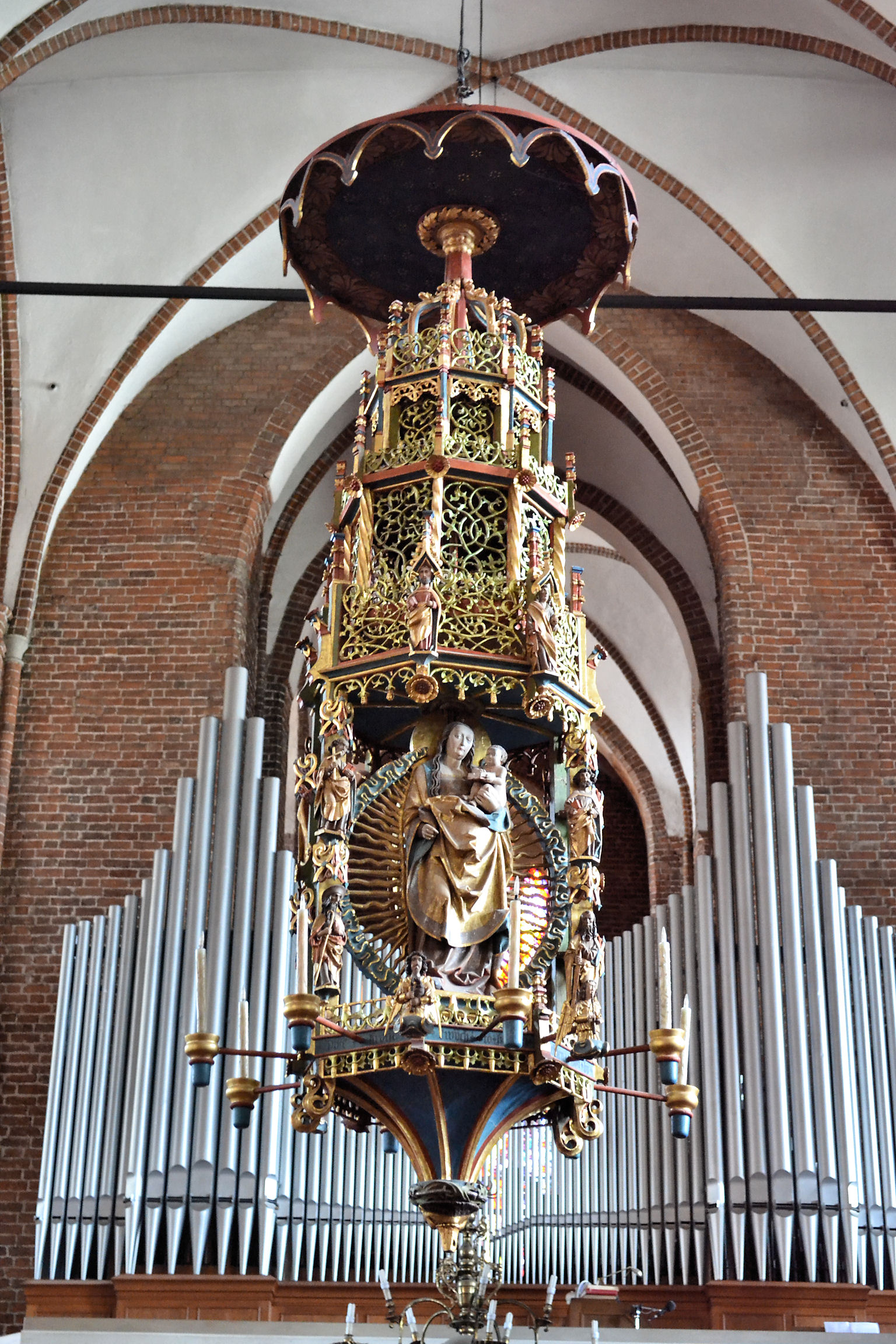 Żyrandol (świecznik) zwany "Koroną Schlieffenów" w katedrze w Kołobrzegu